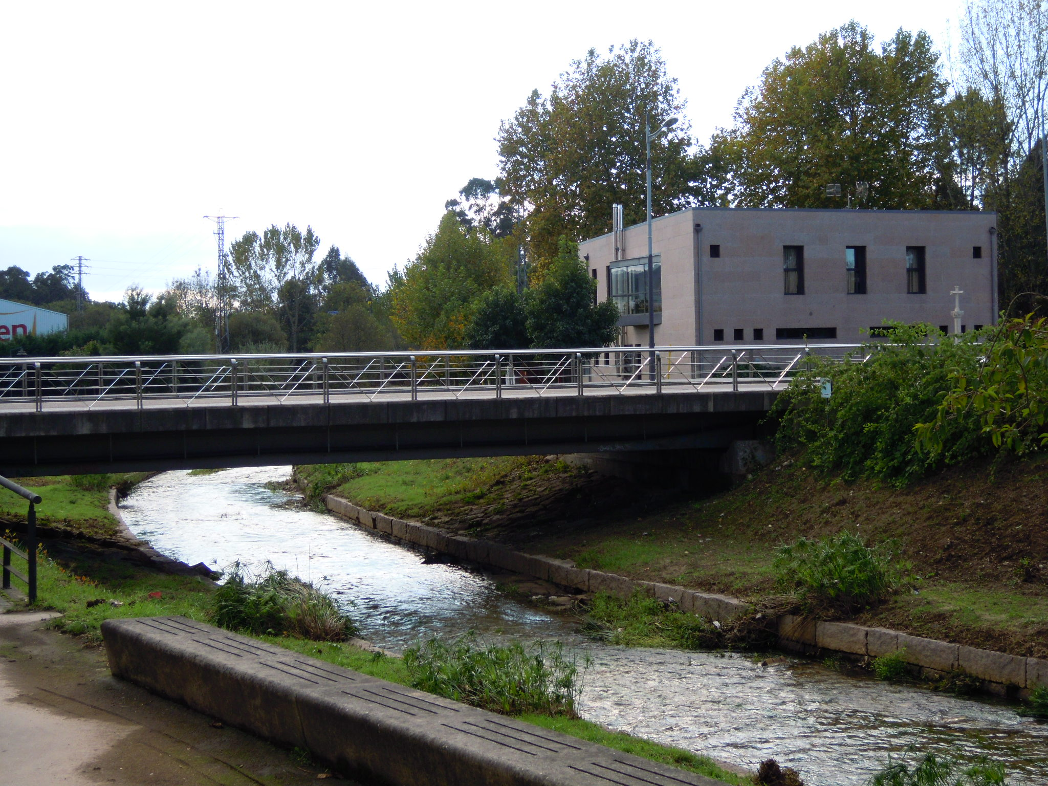 Río Louro ao seu paso polo Porriño, baixo a ponte da PO-331; á dereita, Albergue xacobeo do camiño portugués.